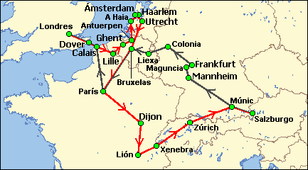 Mapa dos principais lugares visitados pola familia Mozart na súa Gran viaxe familiar por Europa.